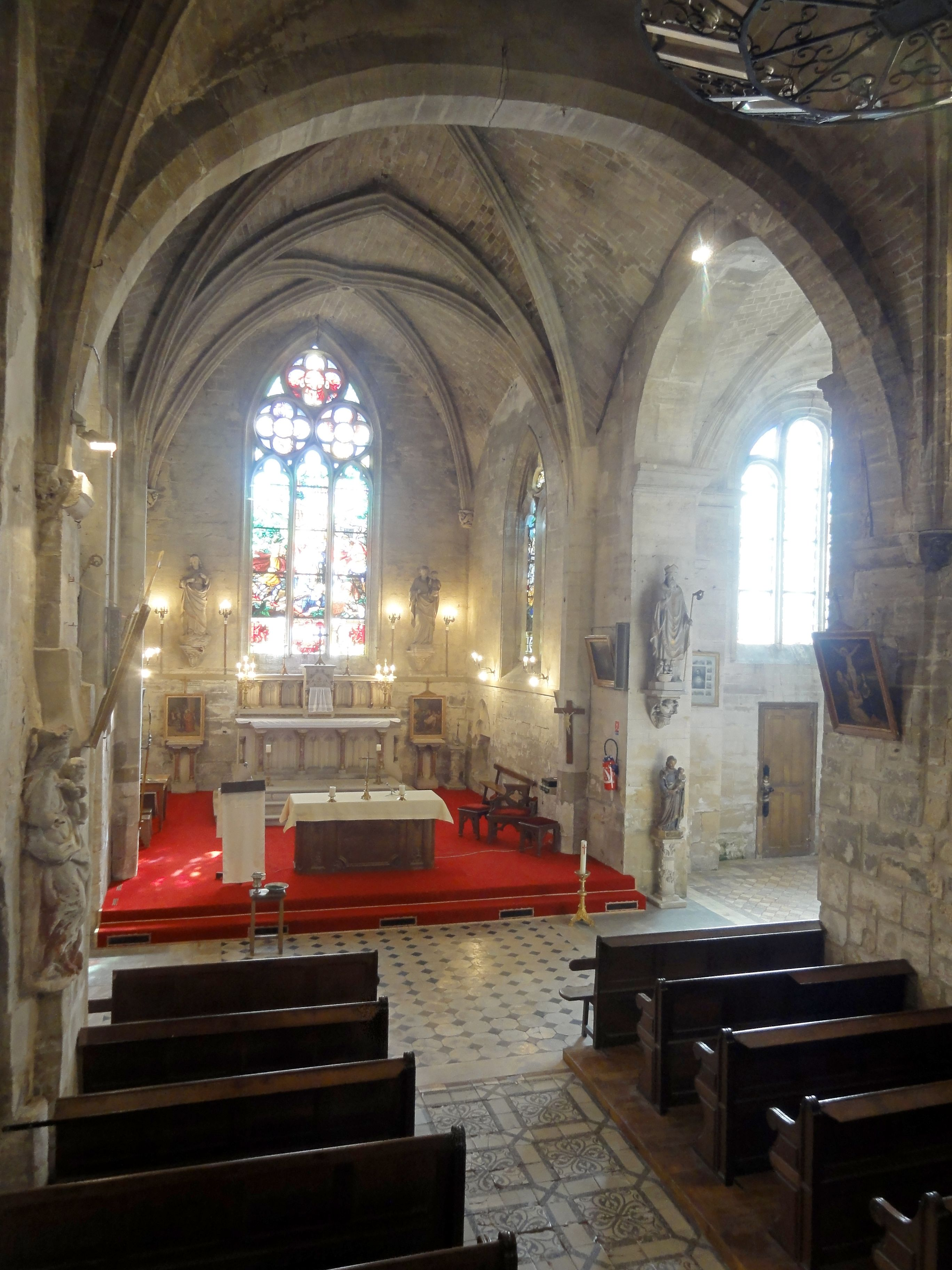 Nef, travée supplémentaire, vue vers l'est.